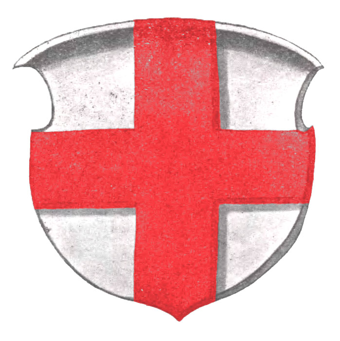 Герб Брацлавщини. У срібному полі червоний хрест.